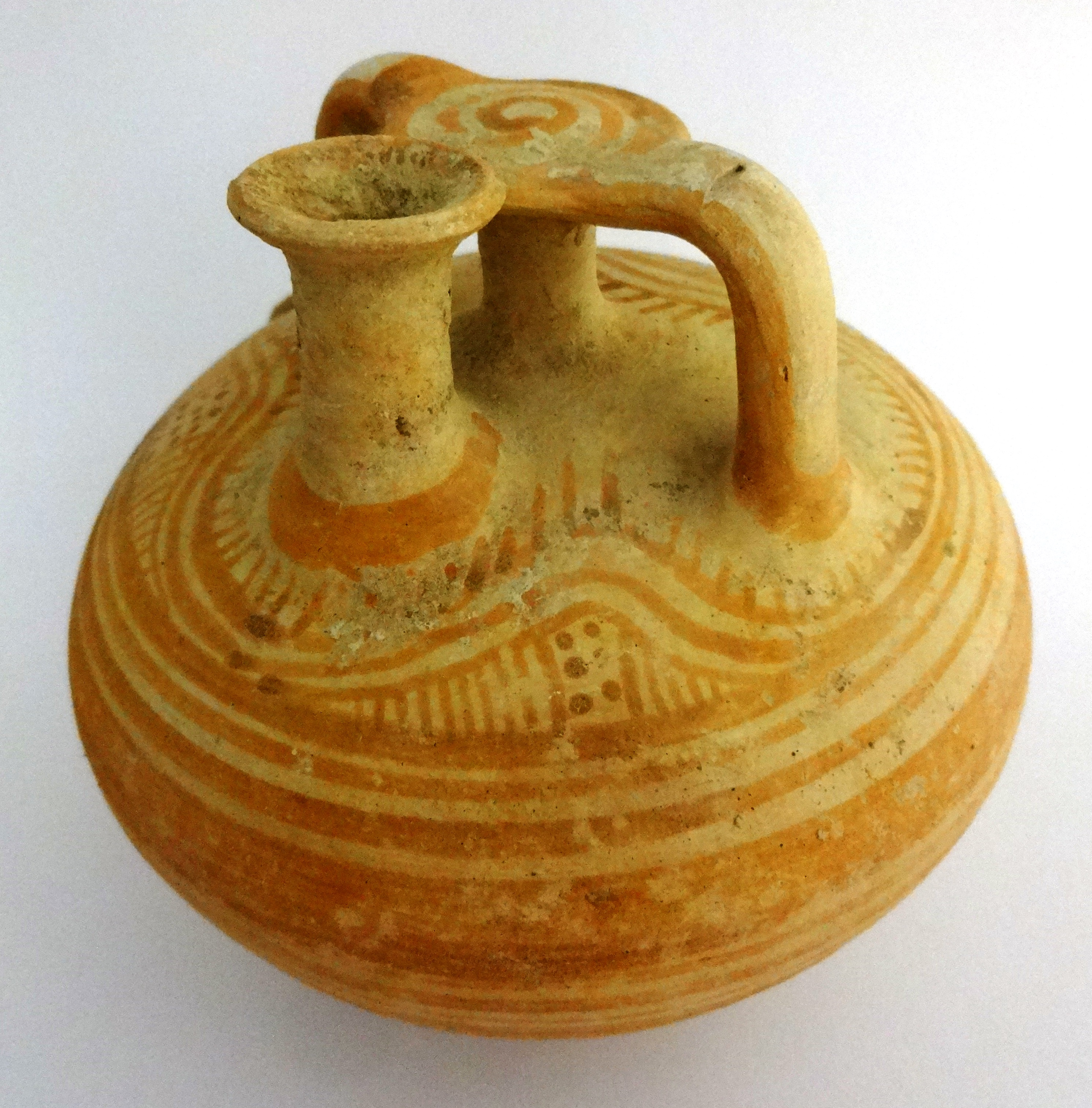 Mykenische Bügelkanne, SH IIIC, 1. Hälfte 11. Jh. v. Chr., ca. 11,6 cm hoch